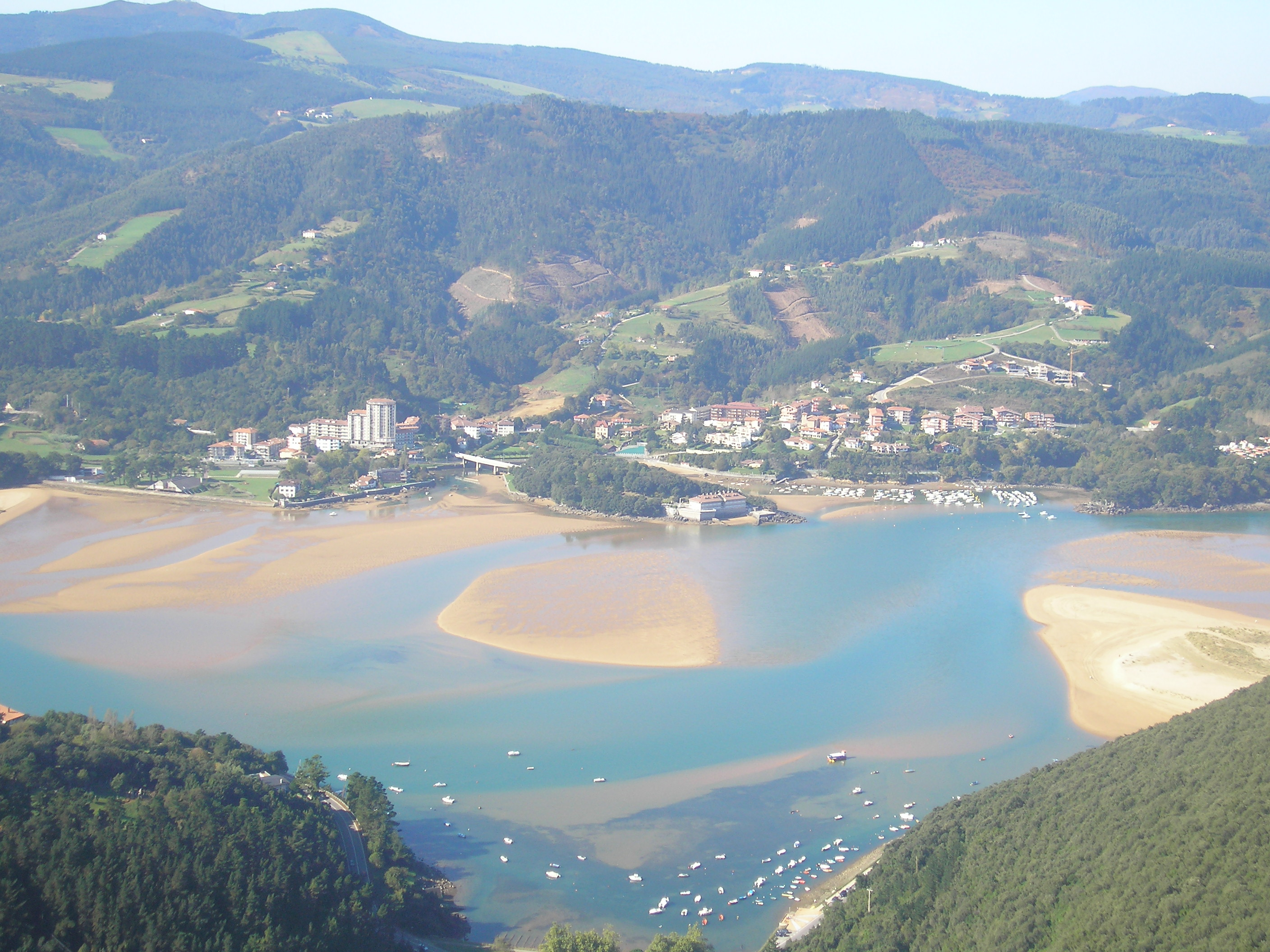 Sukarrieta udalerria Atxarre menditik. Bizkaia, Euskal Herria. Sukarrieta village from Atxarre mountain. Bizkaia, Basque Country.